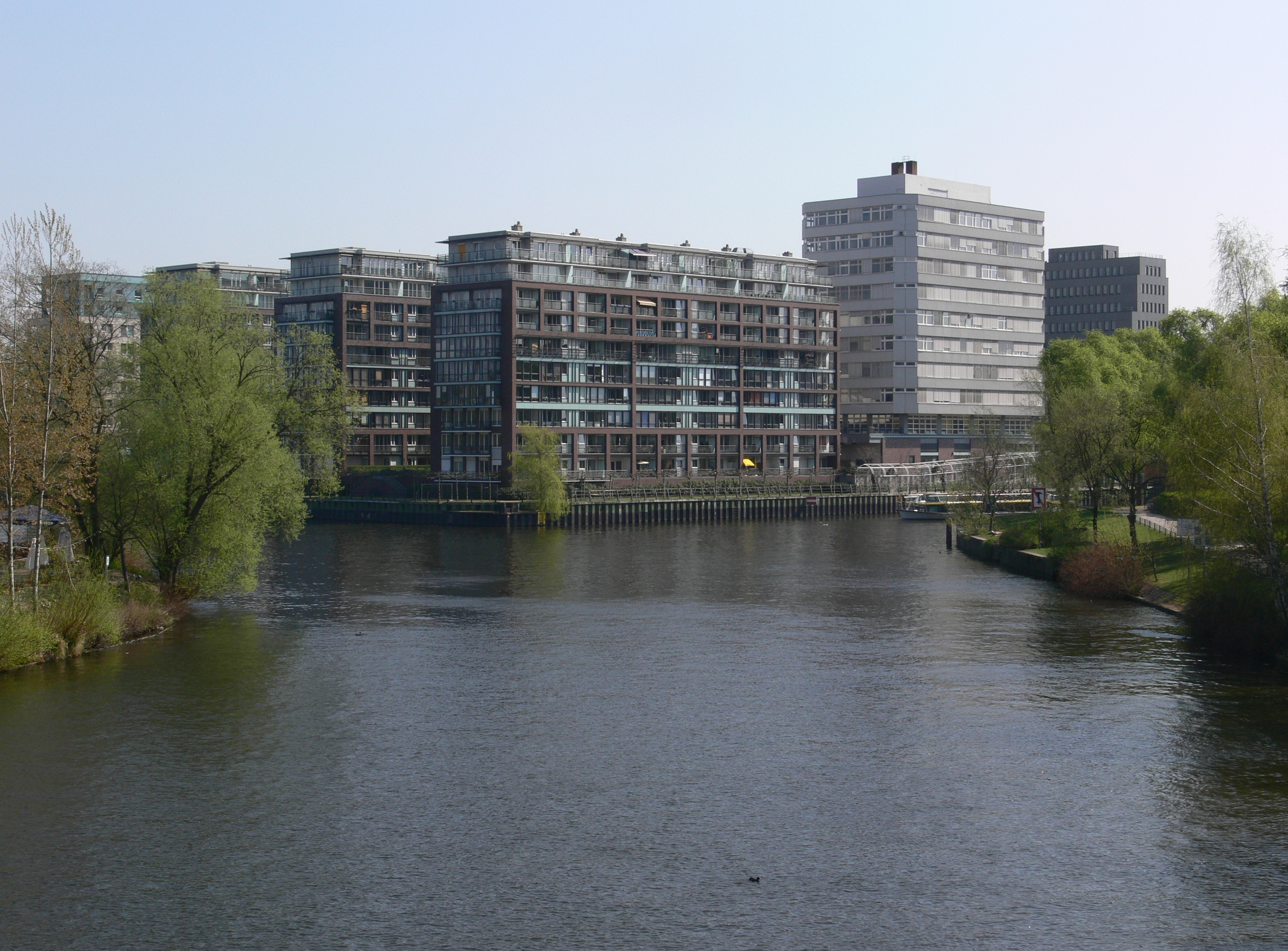 Berlin-Charlottenburg, Blick von der Röntgenbrücke auf das so genannte "Spreekreuz", im Vordergrund und links die Spree, rechts der Beginn des Landwehrkanals, von ganz links der Charlottenburger Verbindungskanal, im Hintergrund Häuser an der Dovestraße